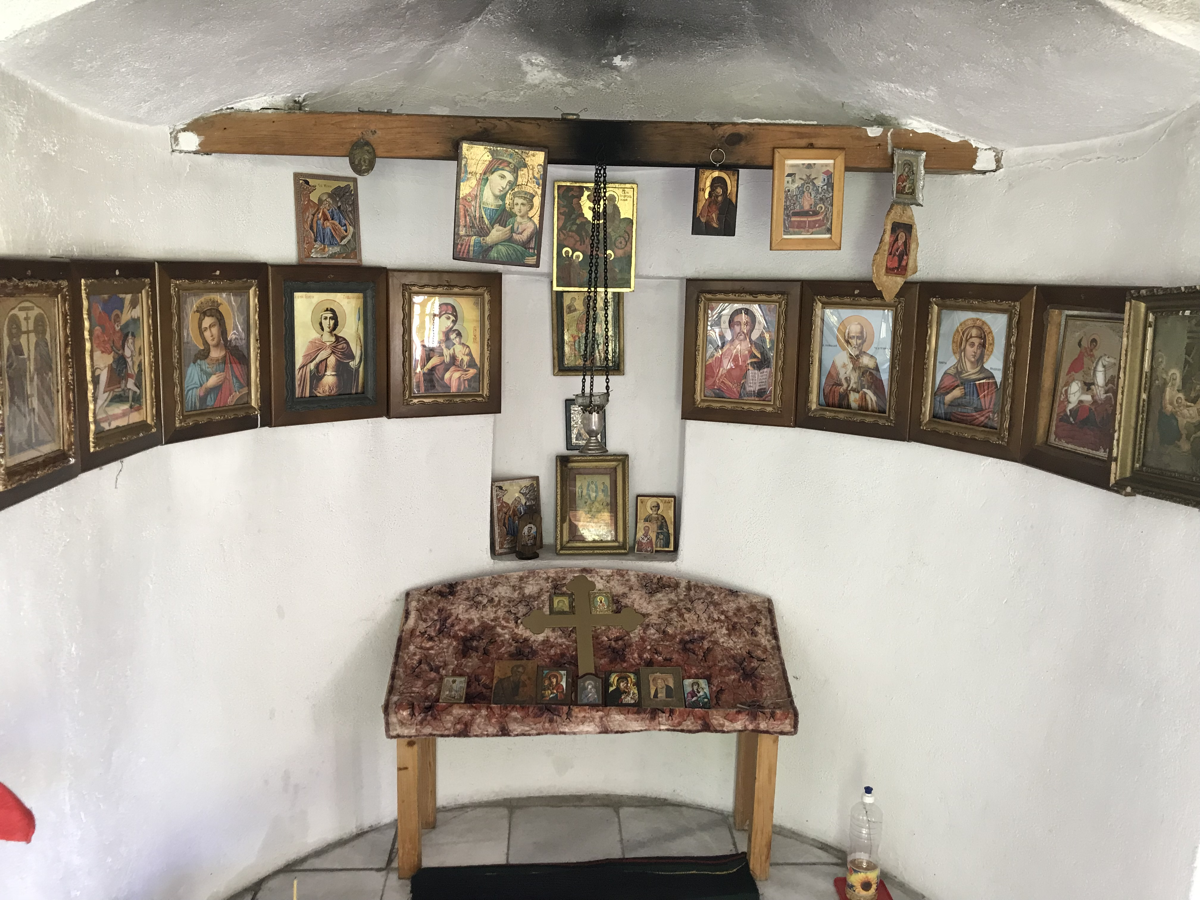 Иконостас в “Свети Илия”, с. Бойково